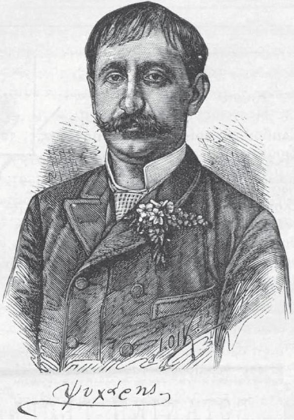 namhafte Griechische Persönlichkeit, 19. Jahrhundert